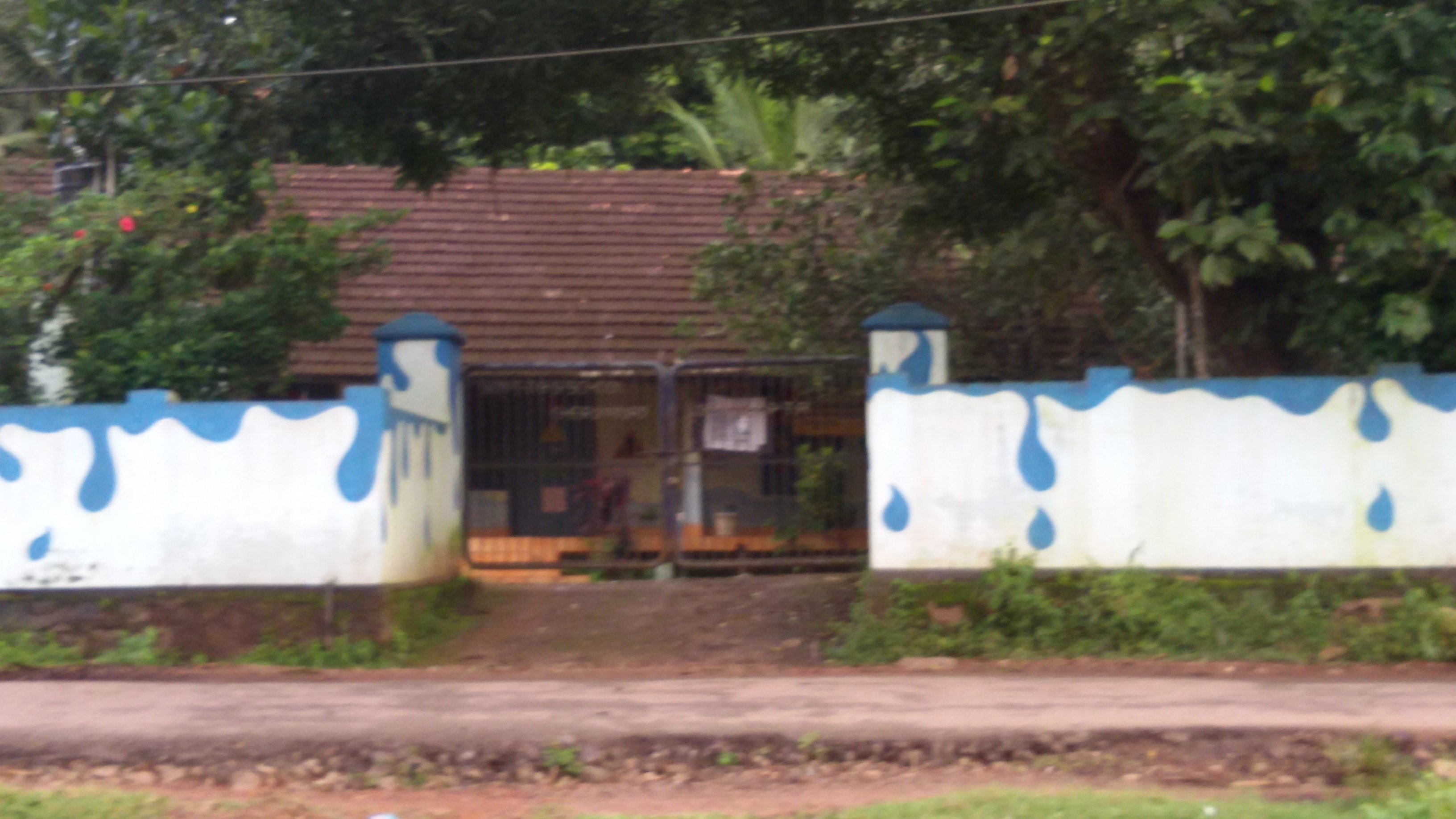 ജെ.ബി.എസ് സ്കൂൾ(ബോയ്സ്&ഗേൾസ്),ചെറിയനാട്